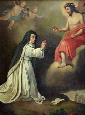 Obraz Błogosławionej Bronisławy, patronki Polski.